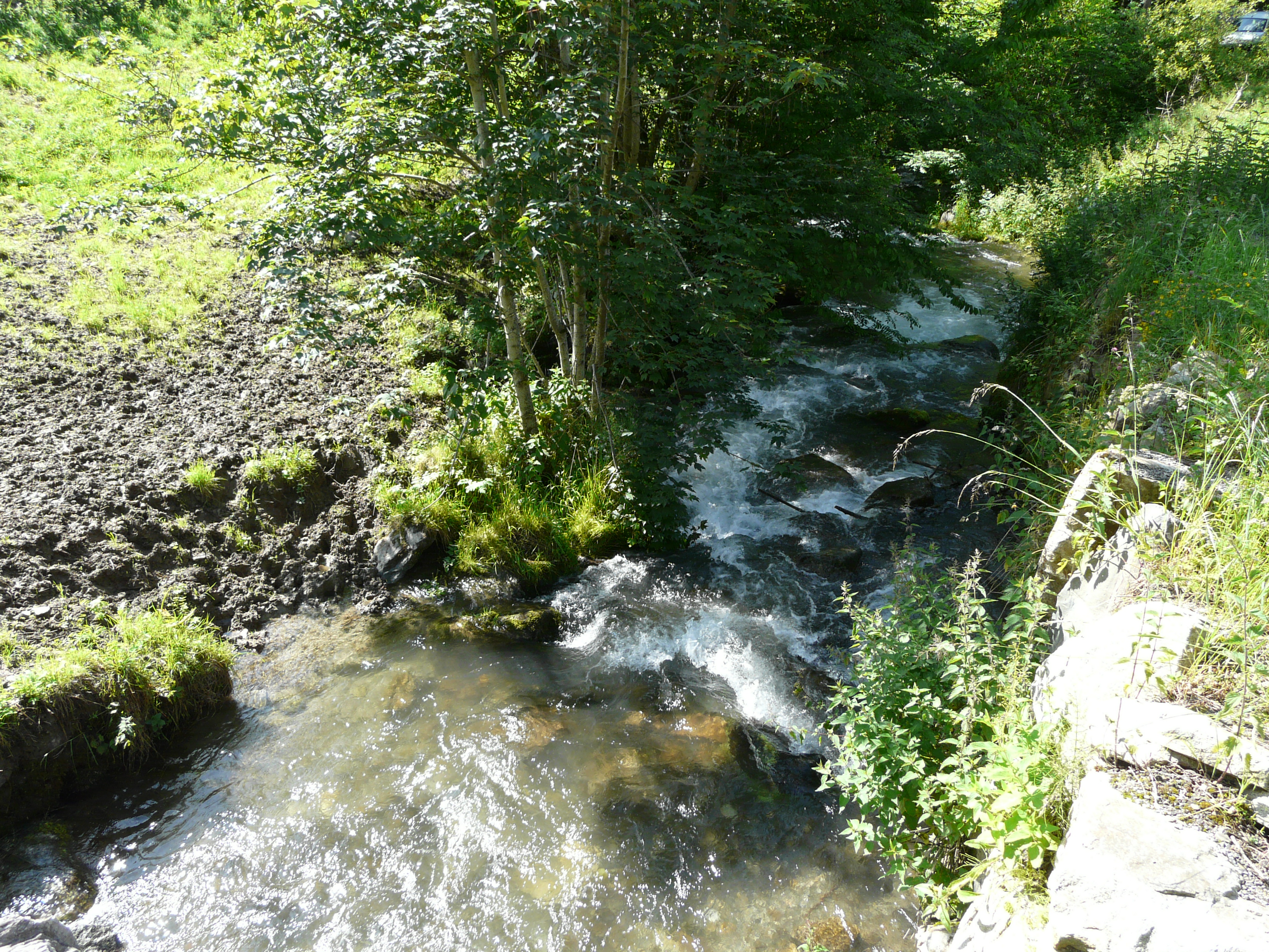 La Neste d'Oueil en aval du pont de la route départementale 51, Saint-Paul-d'Oueil, Haute-Garonne, France.